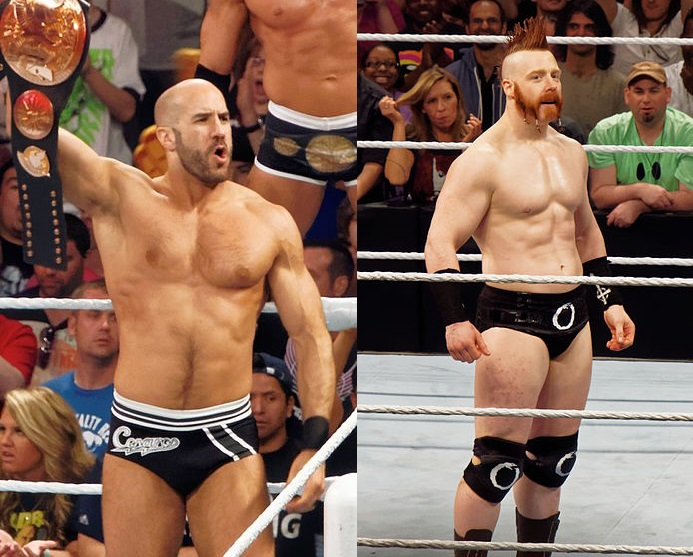 Professional wrestlers Cesaro and Sheamus.